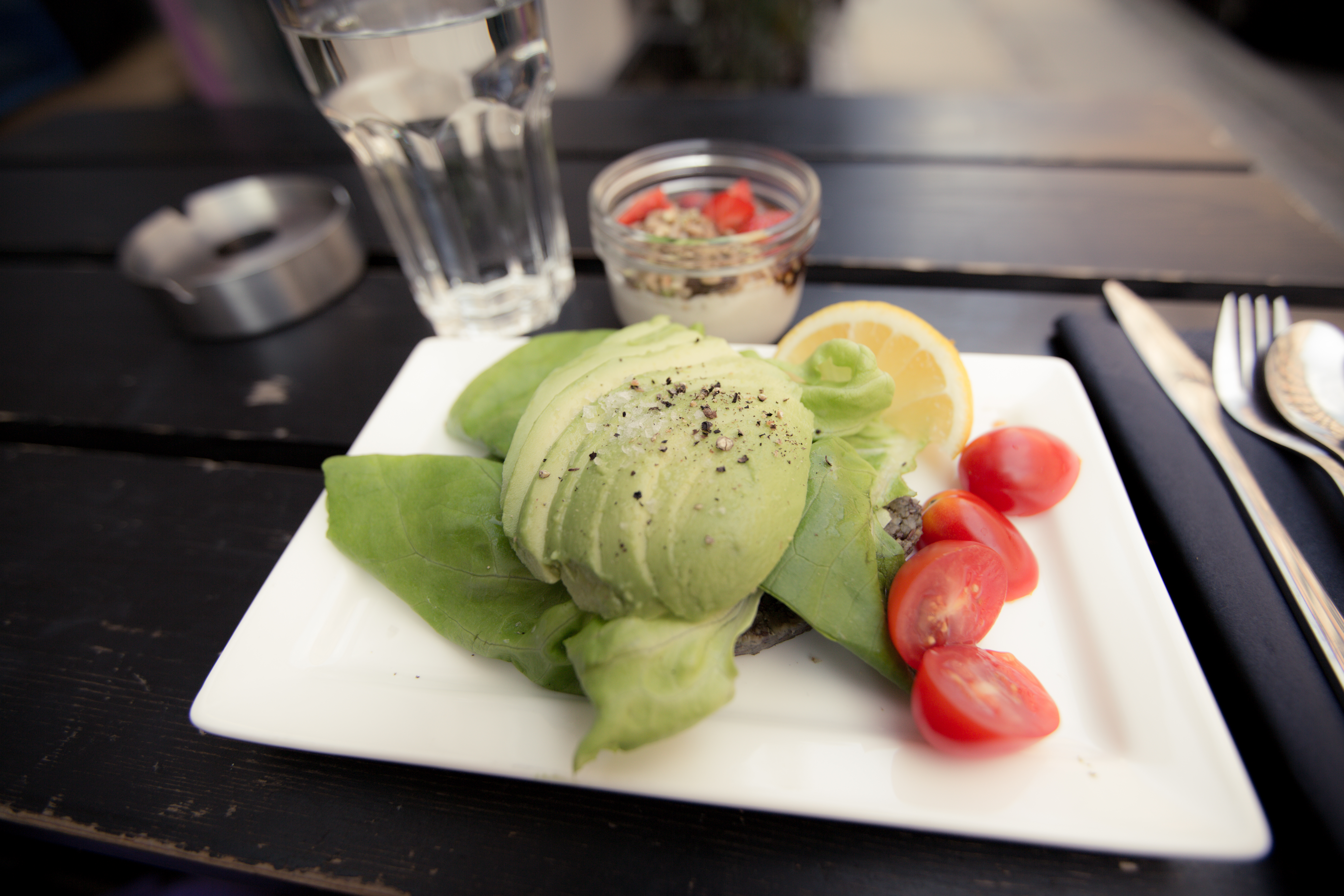 Copenhagen, Denmark Licensing